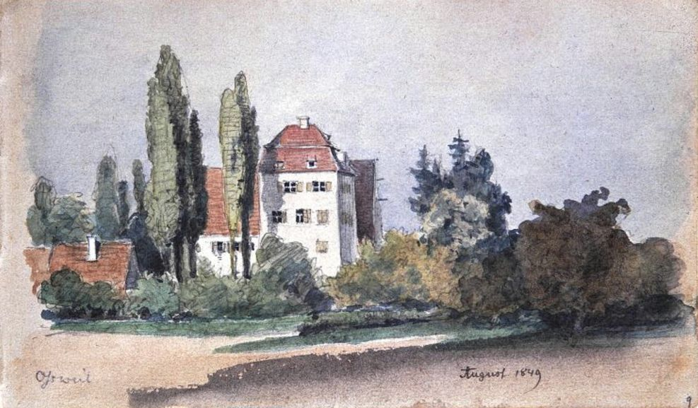 Oßweil. Blick auf Gebäude am Ortsrand. (Aquarell)